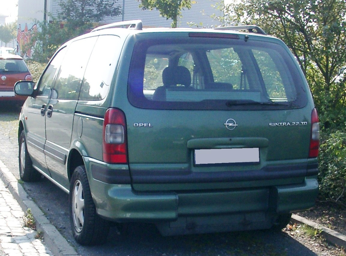 Opel Sintra